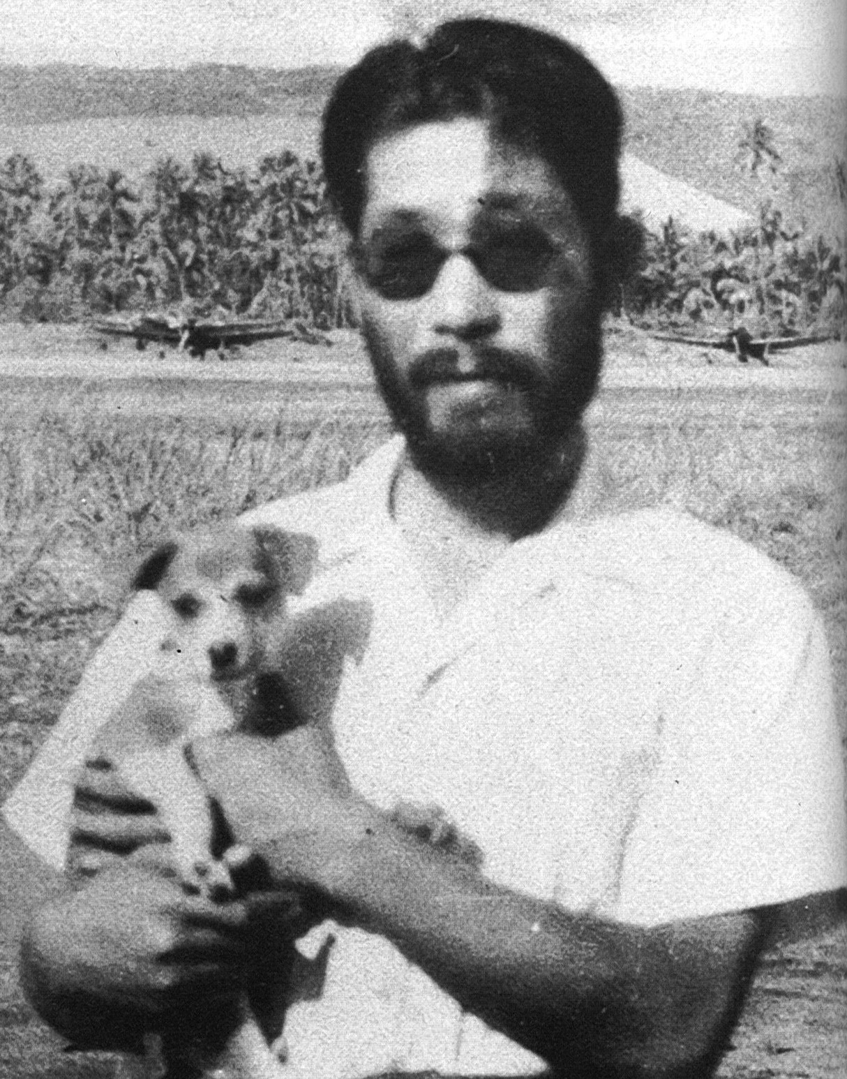 1943年ラバウルで撮影